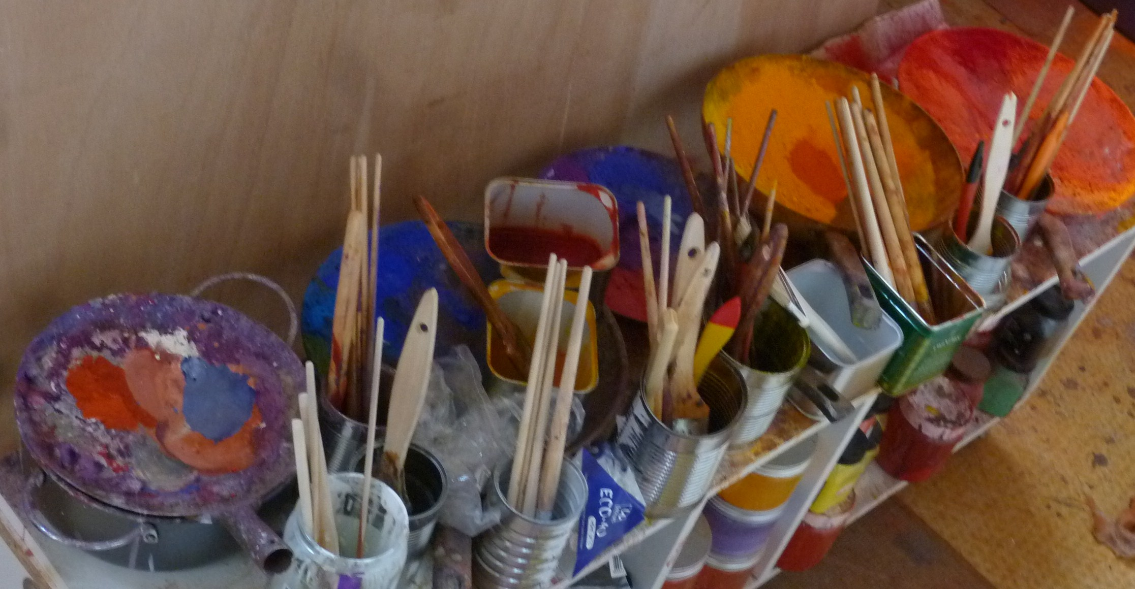 Atelier du peintre Jean-Pierre Ancel, Paris